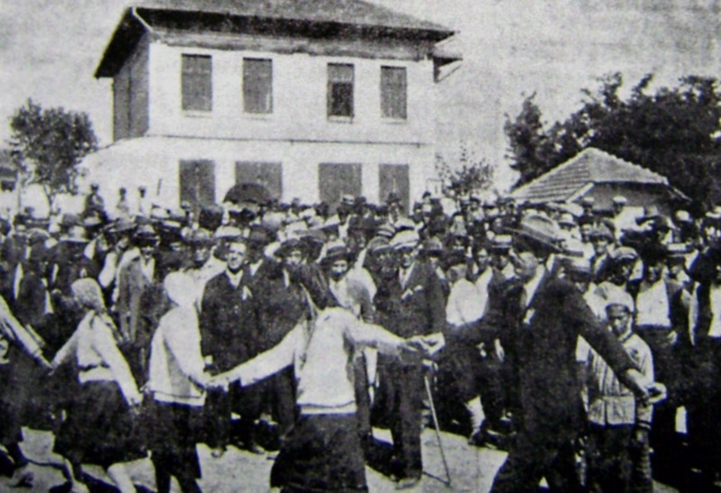 Тържество в село Овча могила по повод първата комасация в страната с участието на министъра на земеделието Григор Василев.